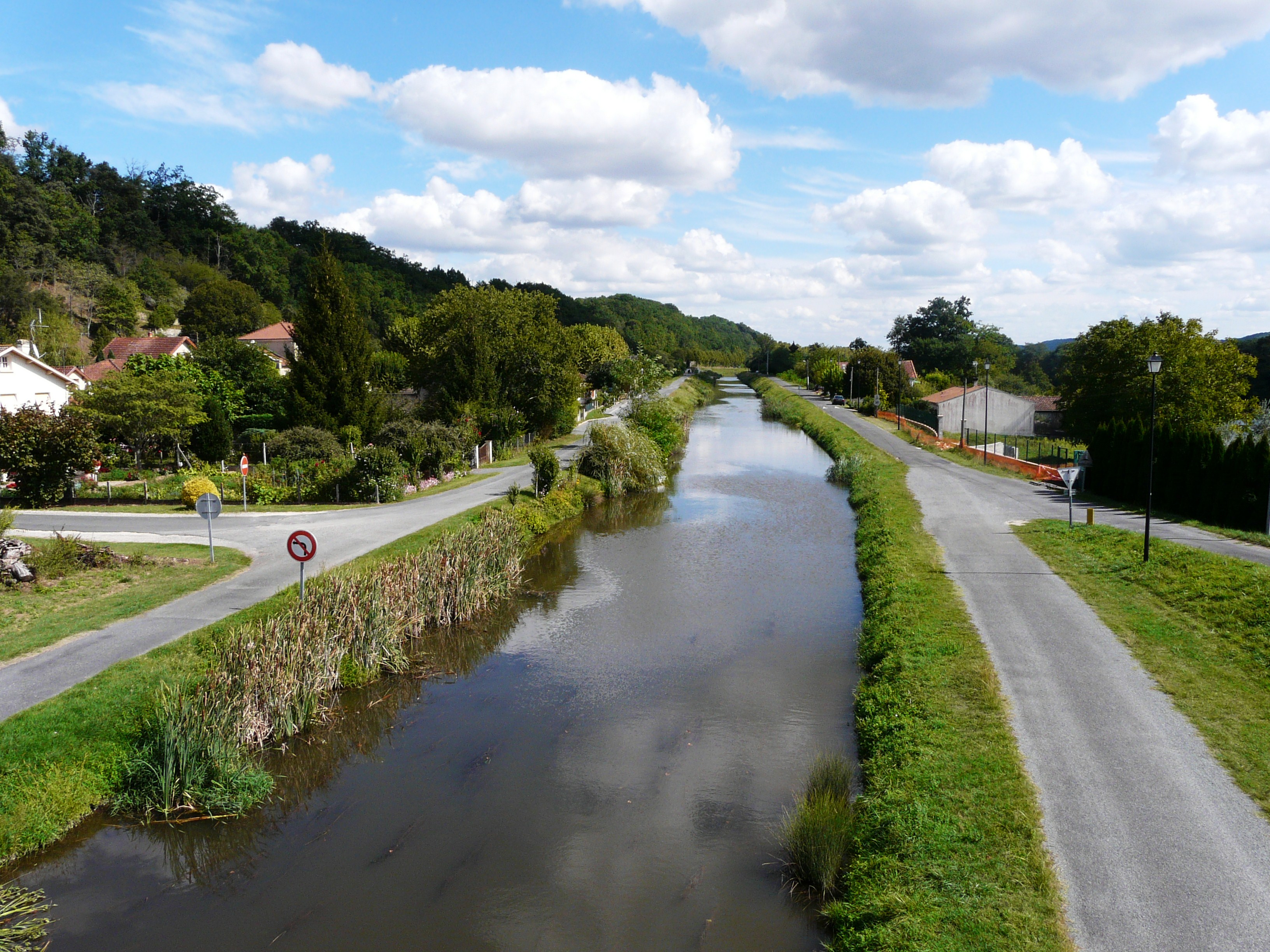 Le canal de Lalinde en amont du bourg de Saint-Capraise-de-Lalinde, Dordogne, France.